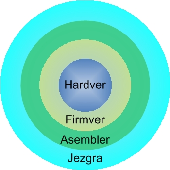 Prikaz arhitekture računala kroz slojeve